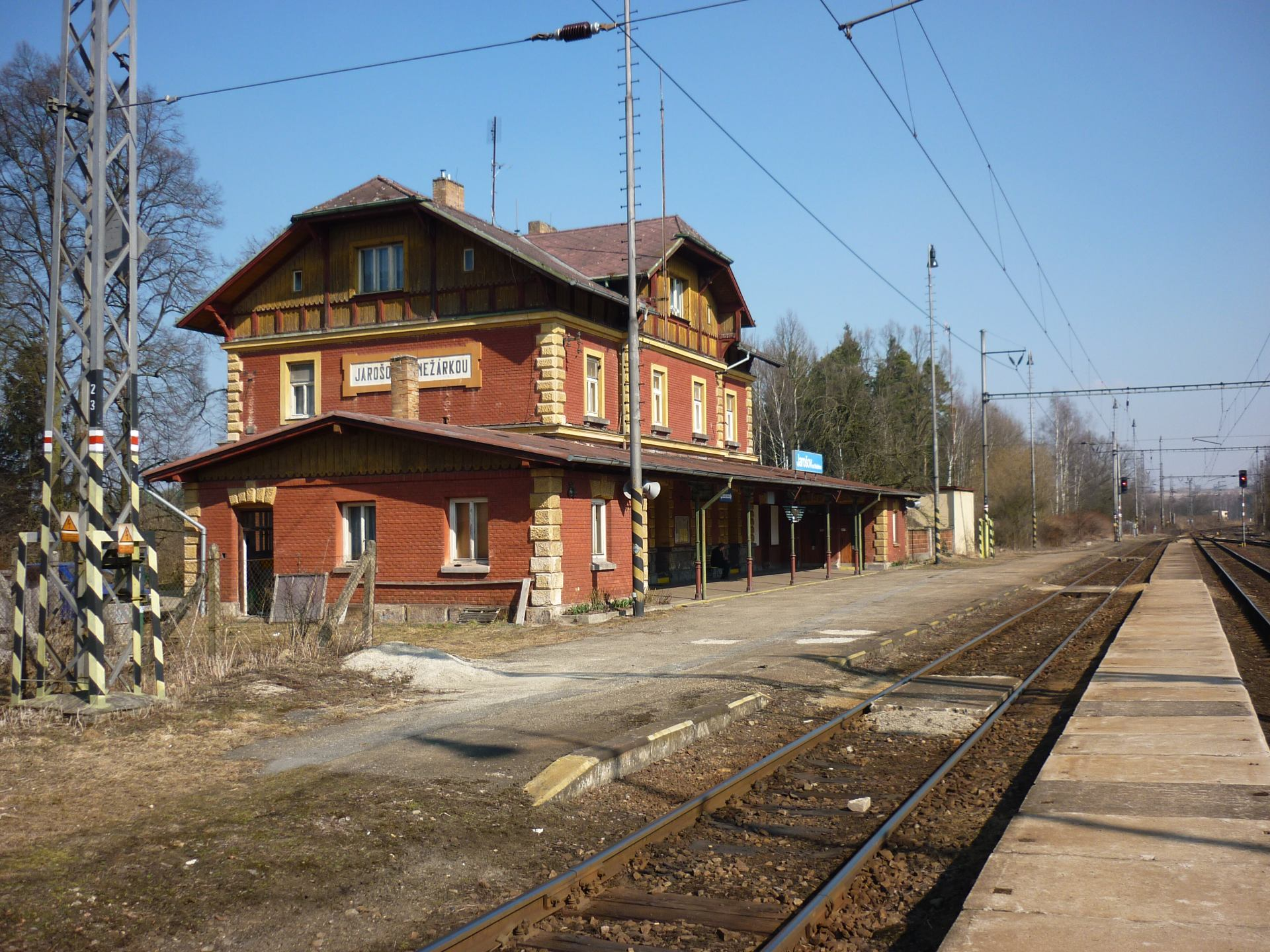 Jarošov nad Nežárkou - nádraží ČD